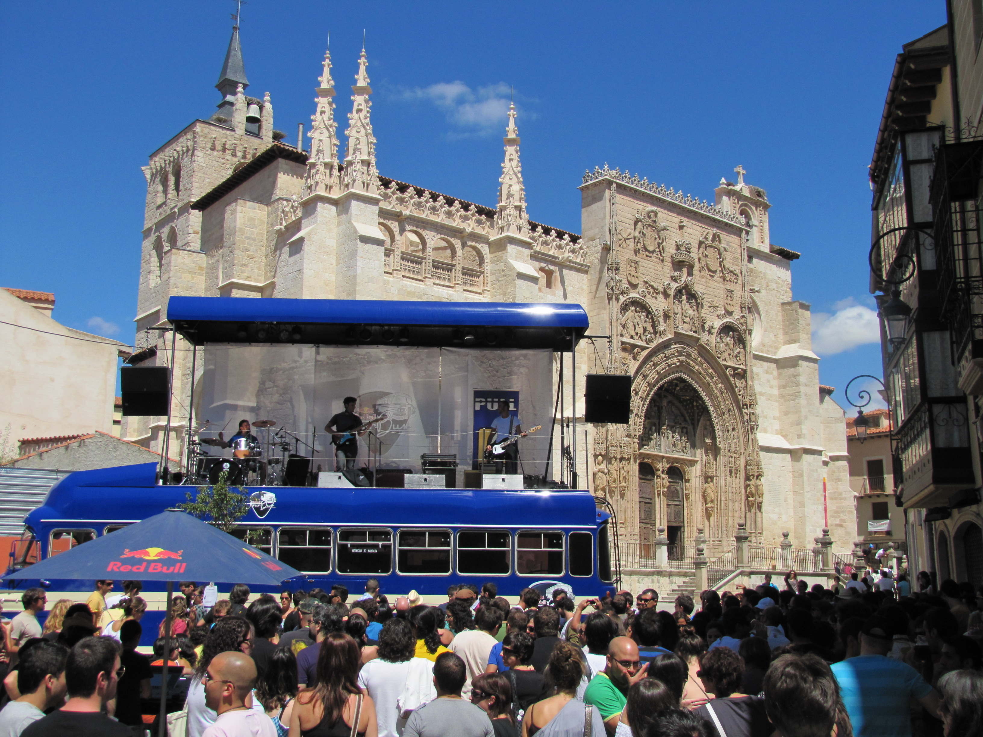 Pull durante su concierto en el Festival Sonorama 2010. En el escenario situado en la Plaza de la Sal (Aranda de Duero), Burgos, España. Al fondo se observa la iglesia de Santa María la Real